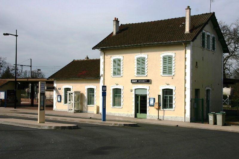 Gare de Mennecy. Le batiment voyageurs.